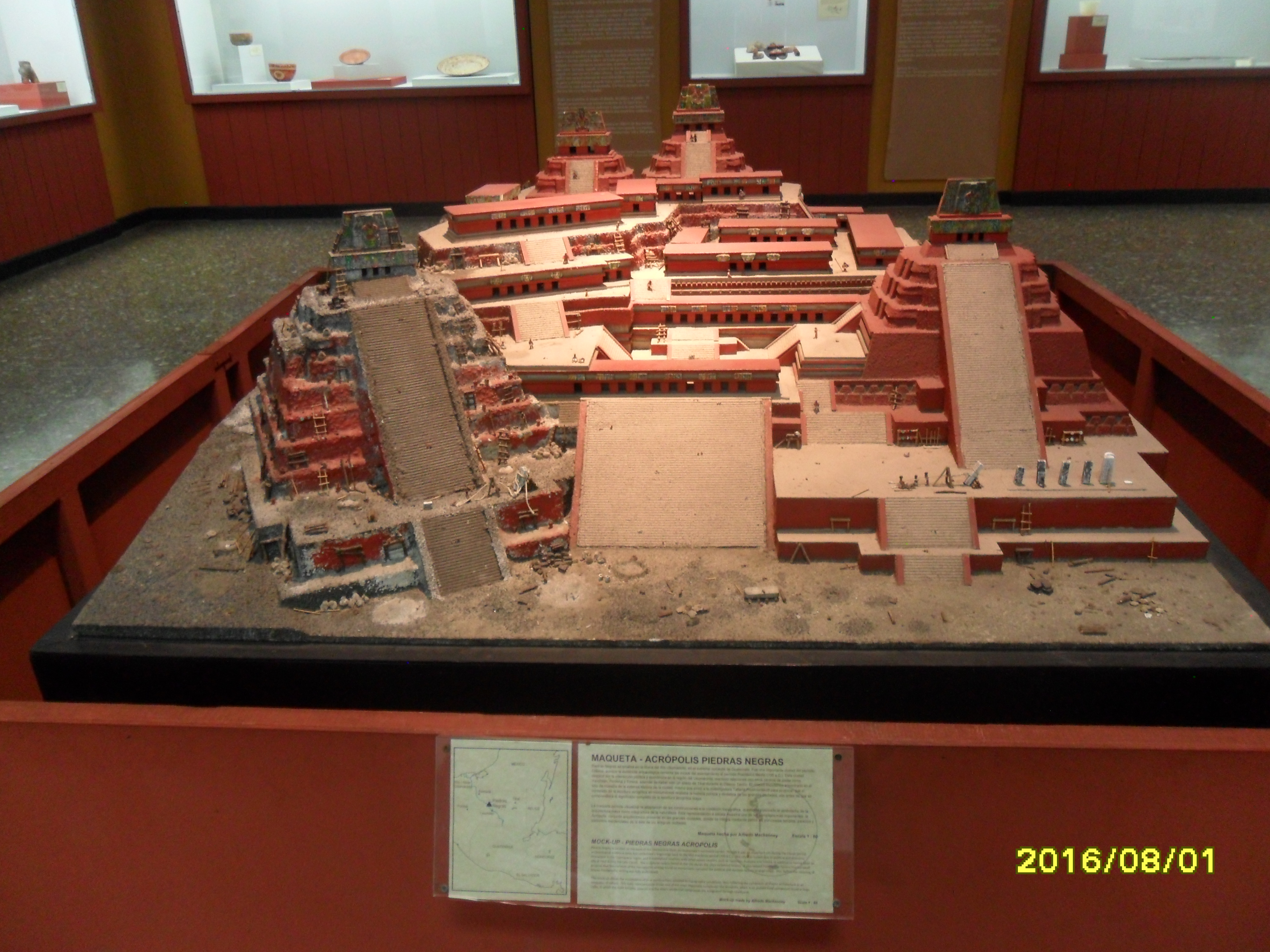 Maqueta Acropolis Piedras Negras, ubicada en el Museo de arqueologia y etnologia de Guatemala